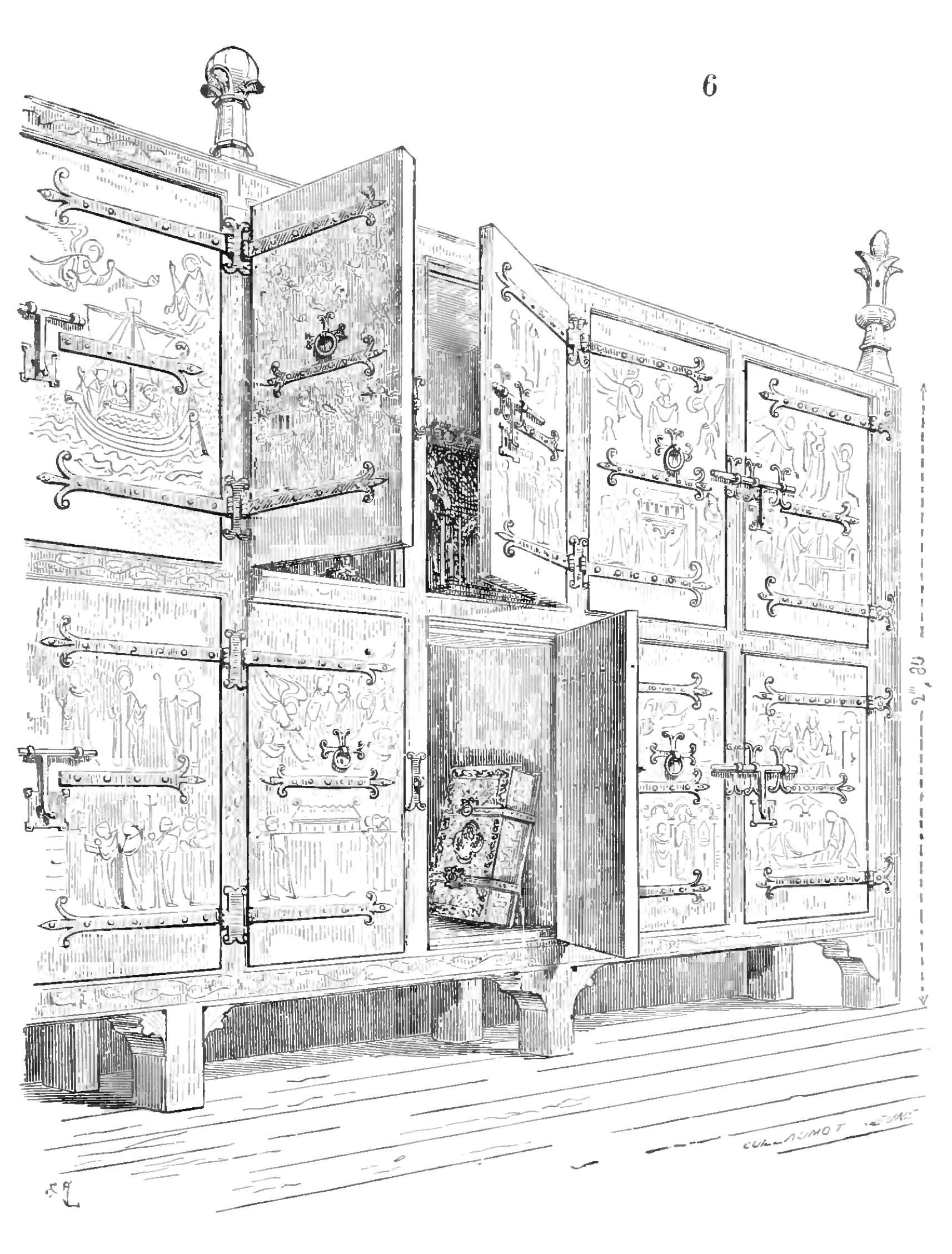 Illustration de l'article « ARMOIRE » du Dictionnaire raisonné du mobilier français.